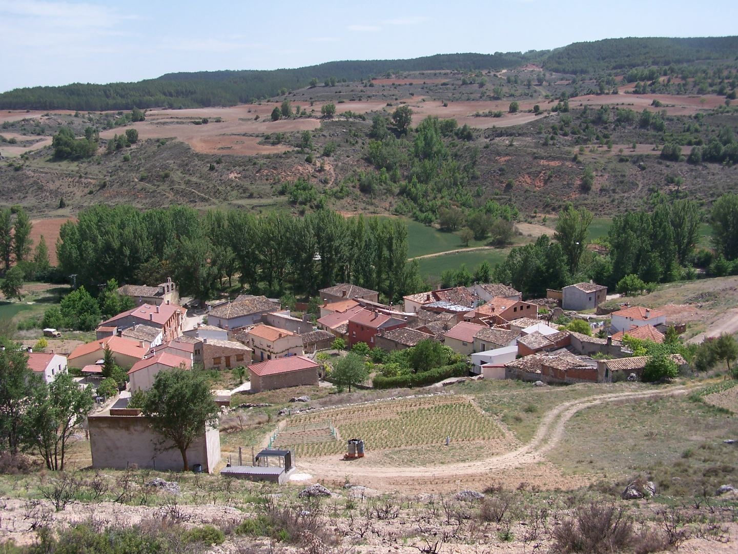 Barriopedro desde la montaña de la antena de telefonia.